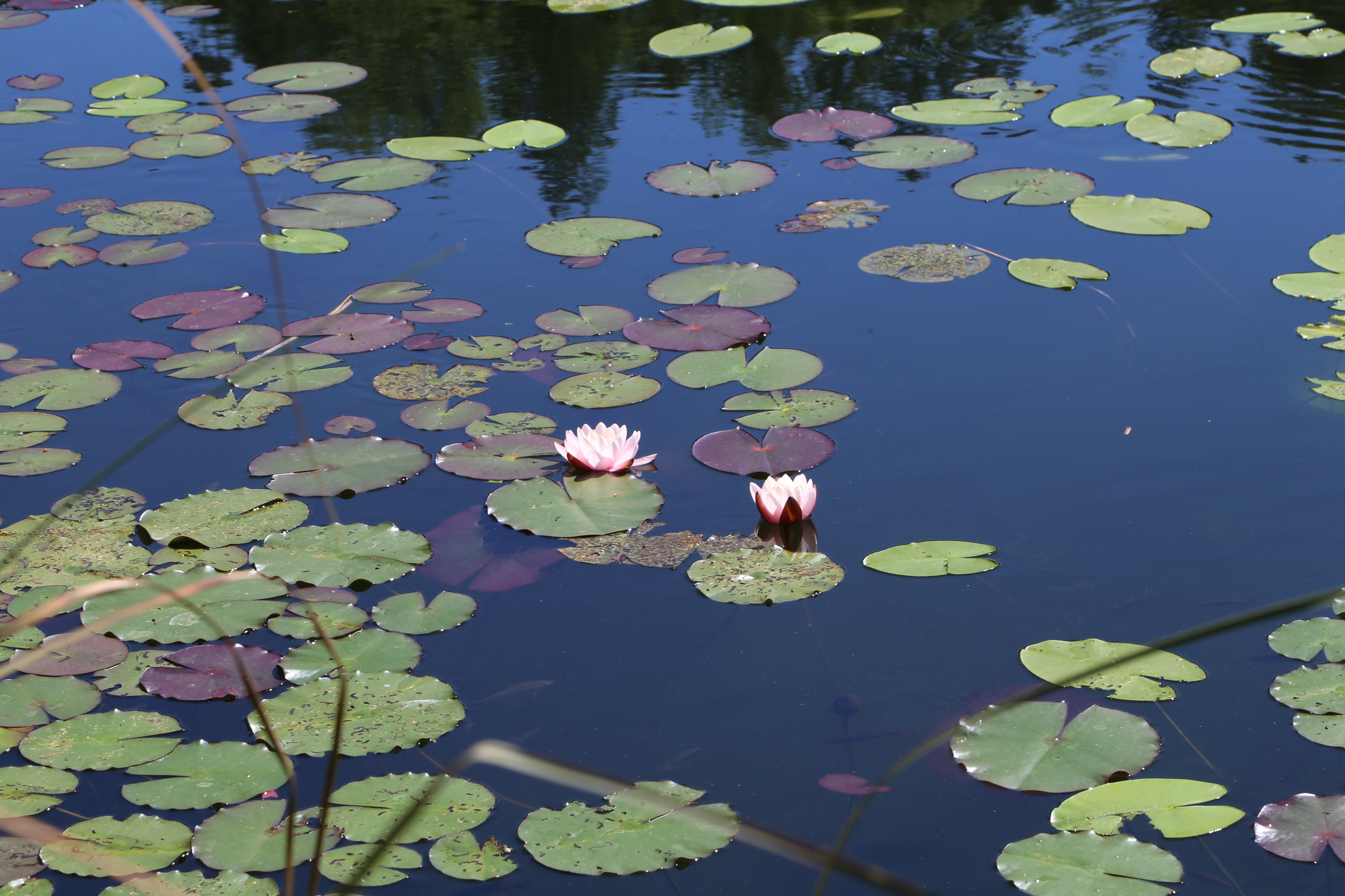 Egelsee, Kufstein This media shows the natural monument in the Tyrol with the ID ND_5_10 (Egelsee mit Uferbereich).